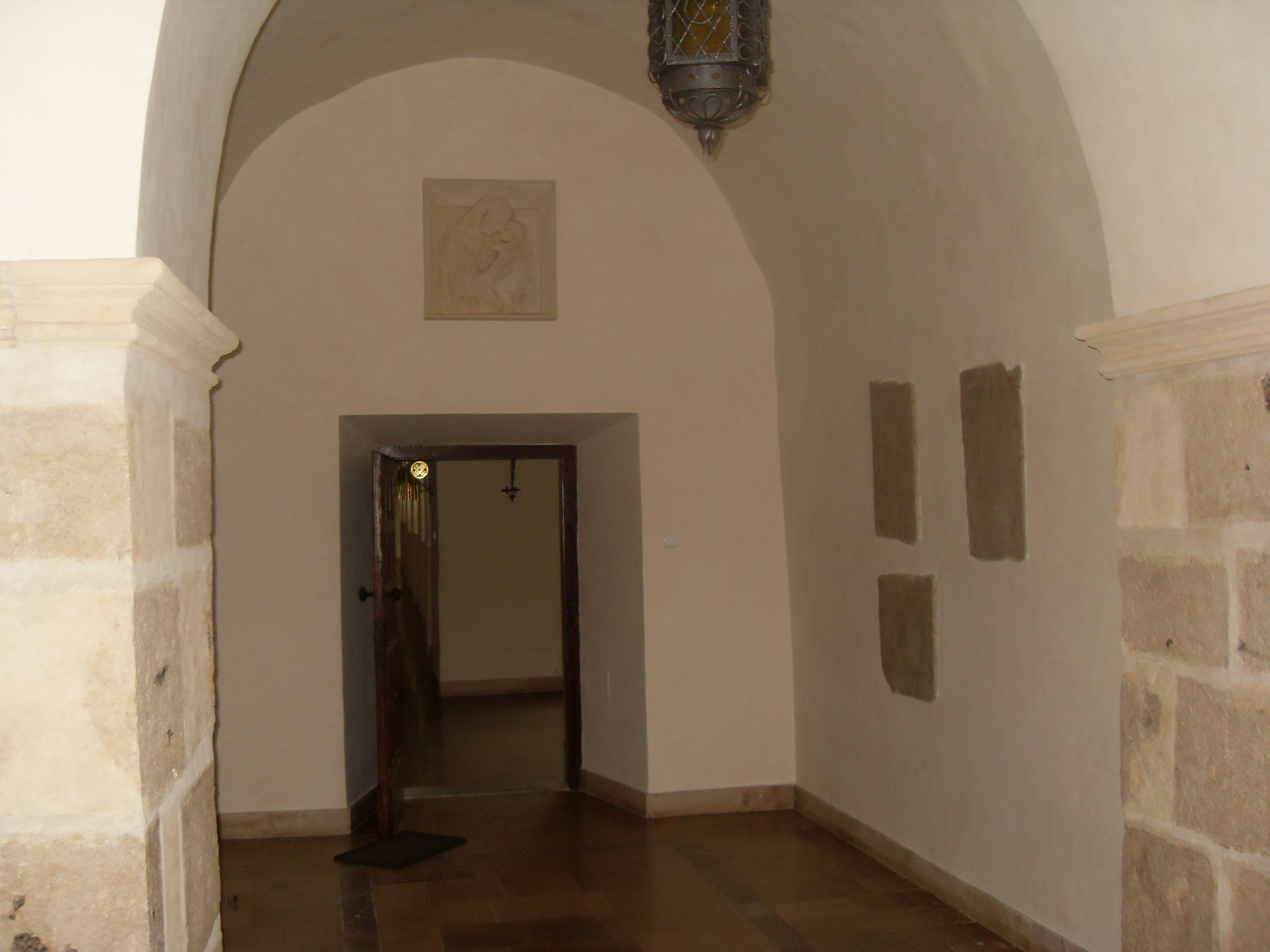 Karcer w klasztorze oo. cystersów w Mogile, w którym więziony był zwolennik husytyzmu ks. Andrzej Gałka.